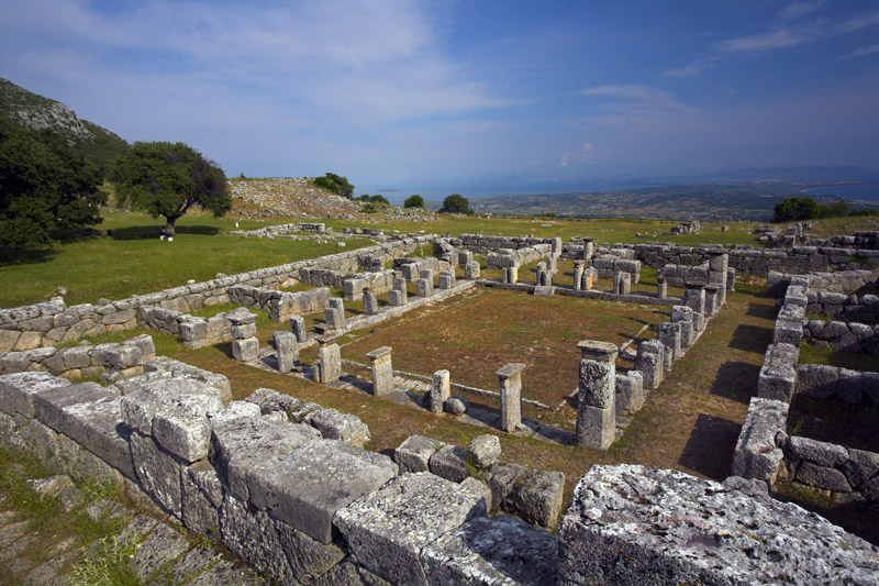 Φωτογραφία αρχαιολογικού χώρου